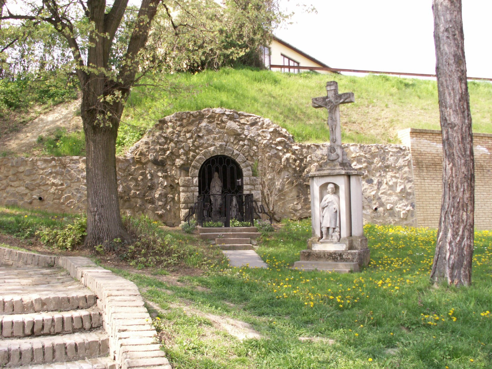 Ez a kép a teveli Lourdes-i kápolnát ábrázolja. Saját magam készítettem.